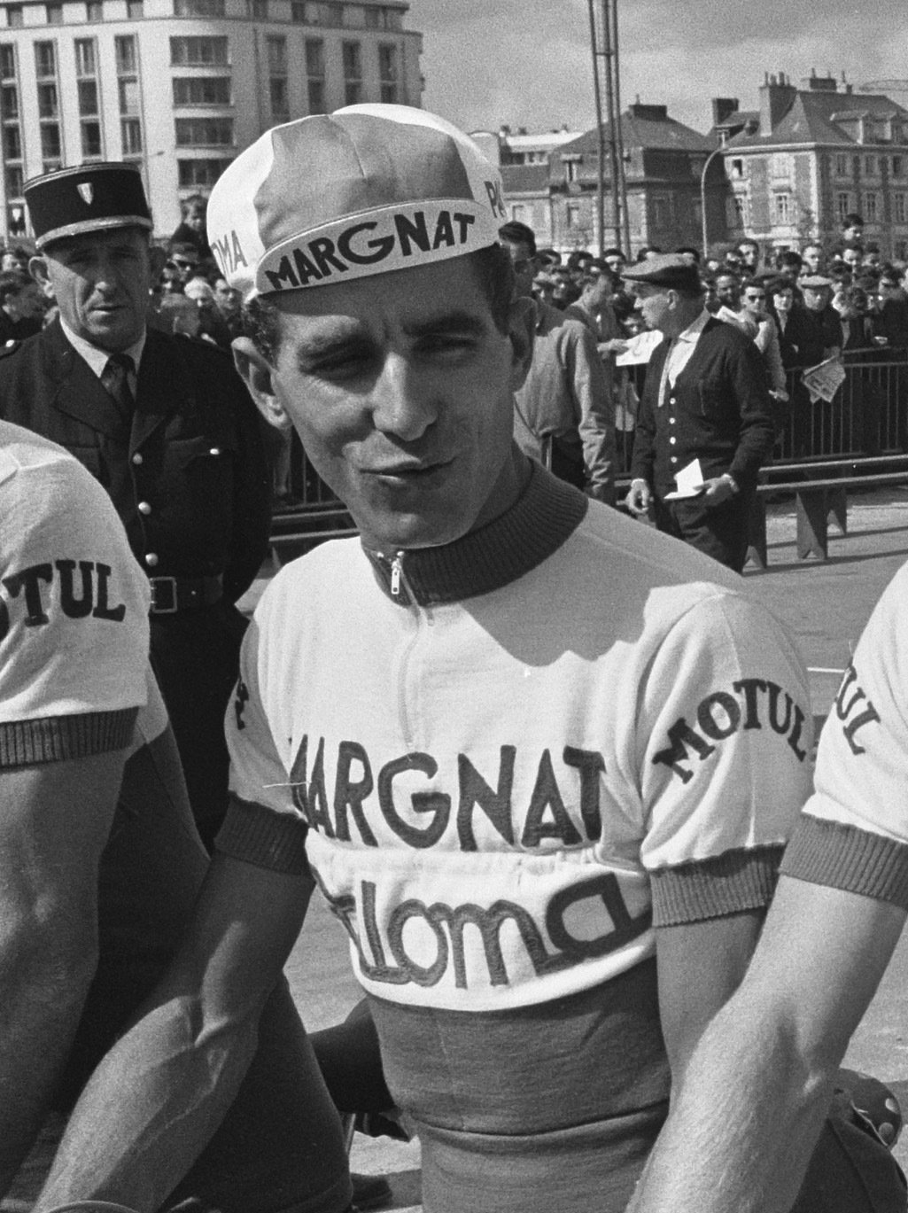 51ste Tour de France 1964, de ploeg van Margnat met in midden Andre Darrigade.